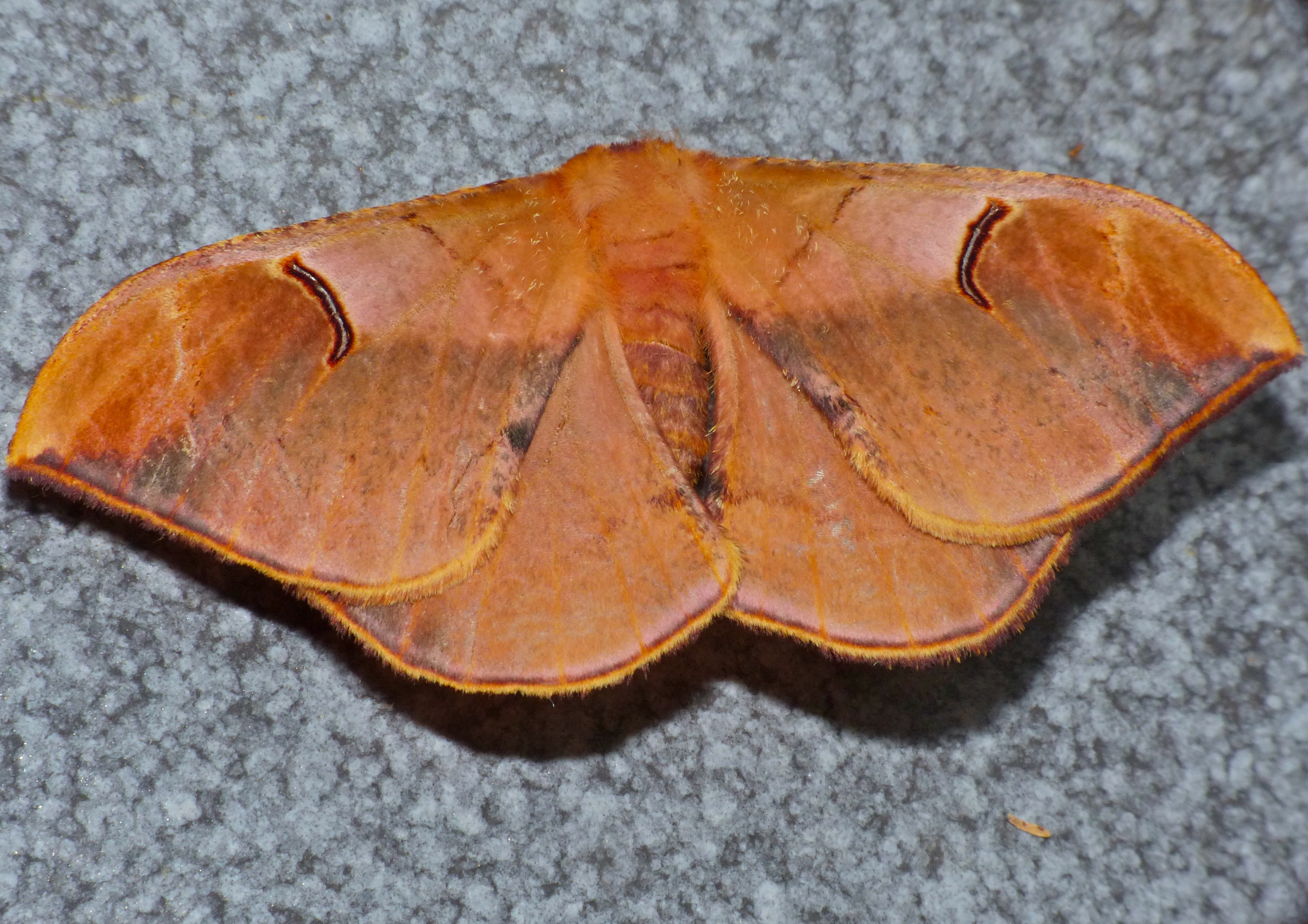 Safari Tent N°12, Lower Sabie Camp, Kruger NP, SOUTH AFRICA